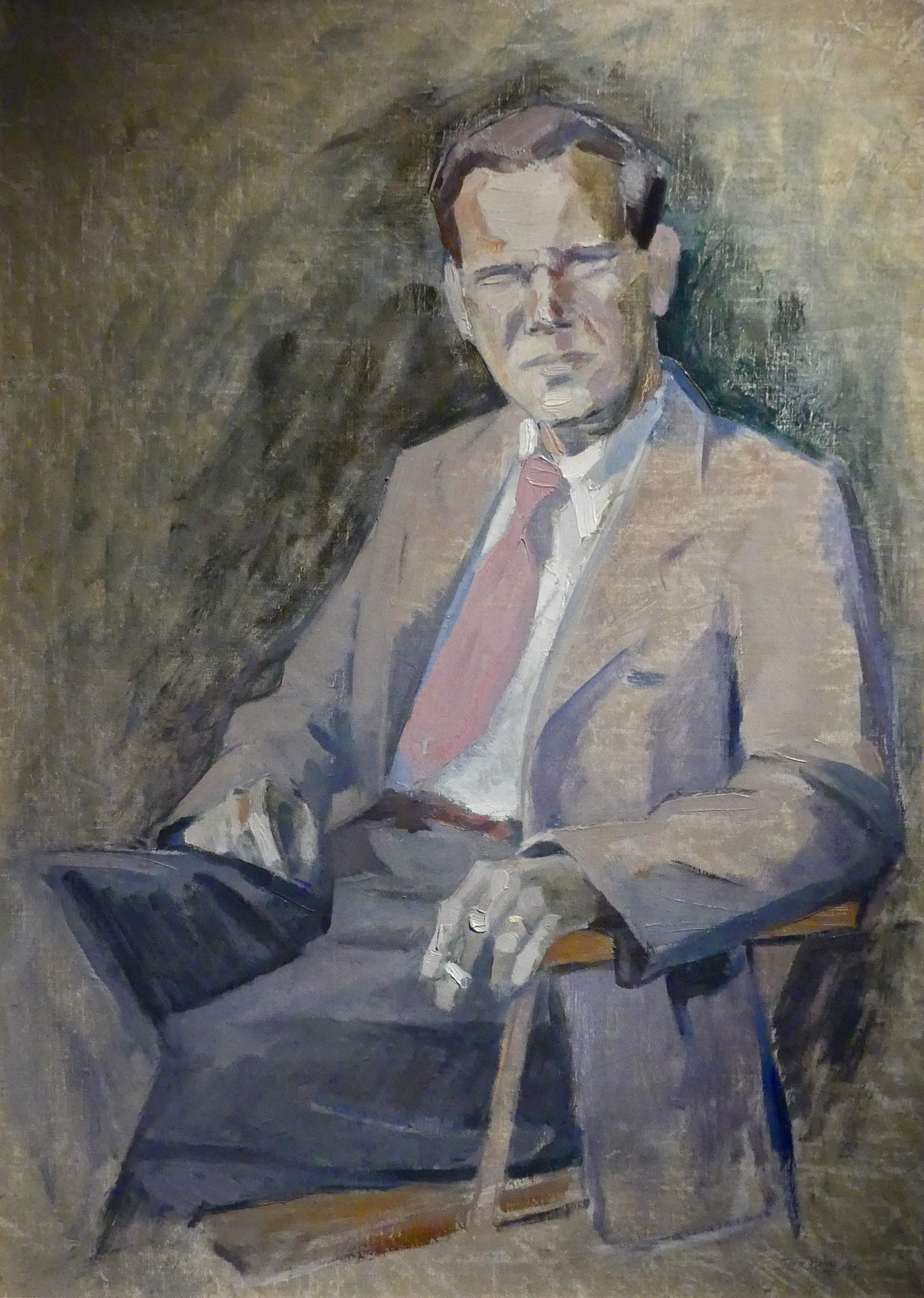 Rolf Heby, porträtterad 1955 av äldste sonen, konstnären Tore Heby